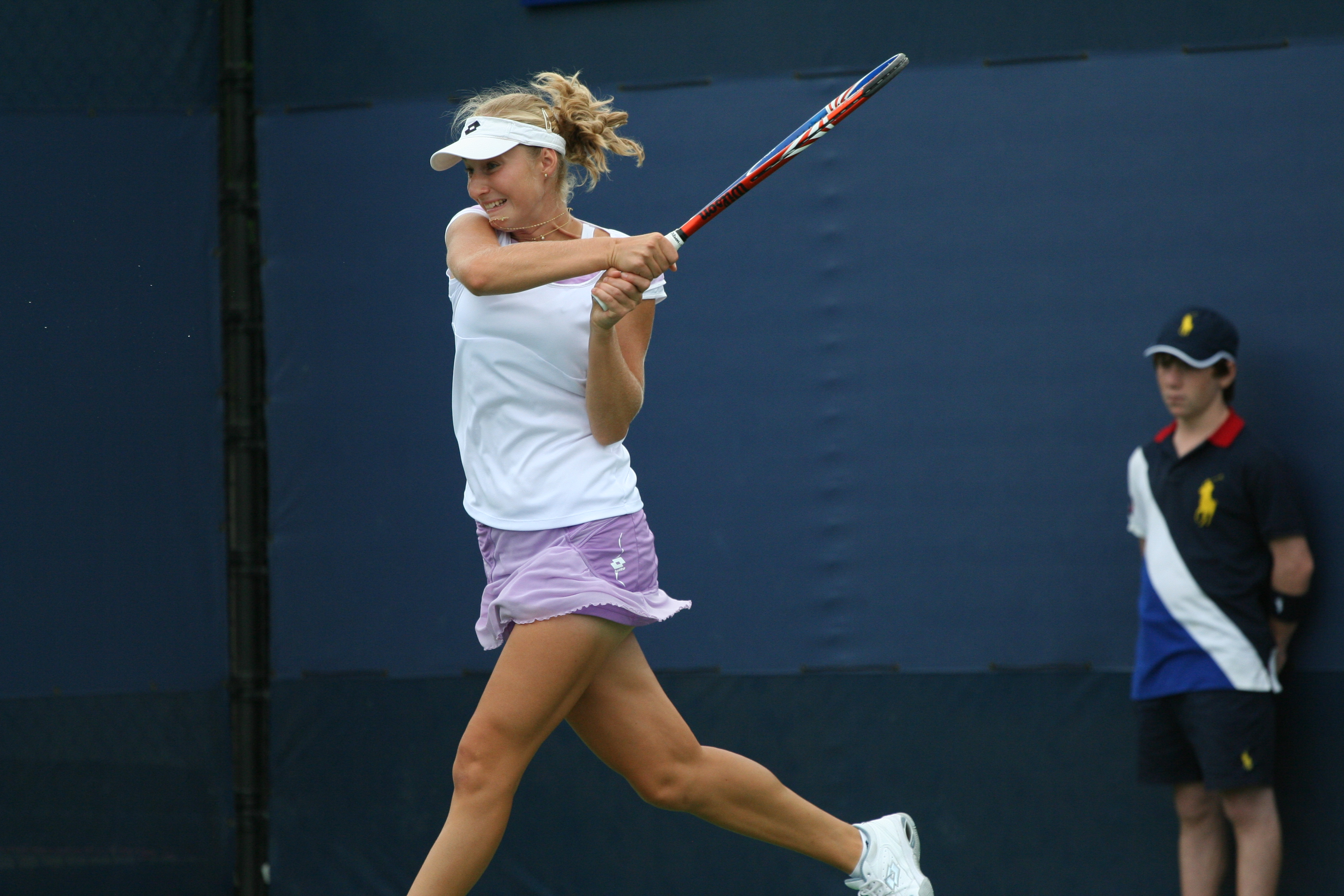 U.S. Open Sept. 3, 2010